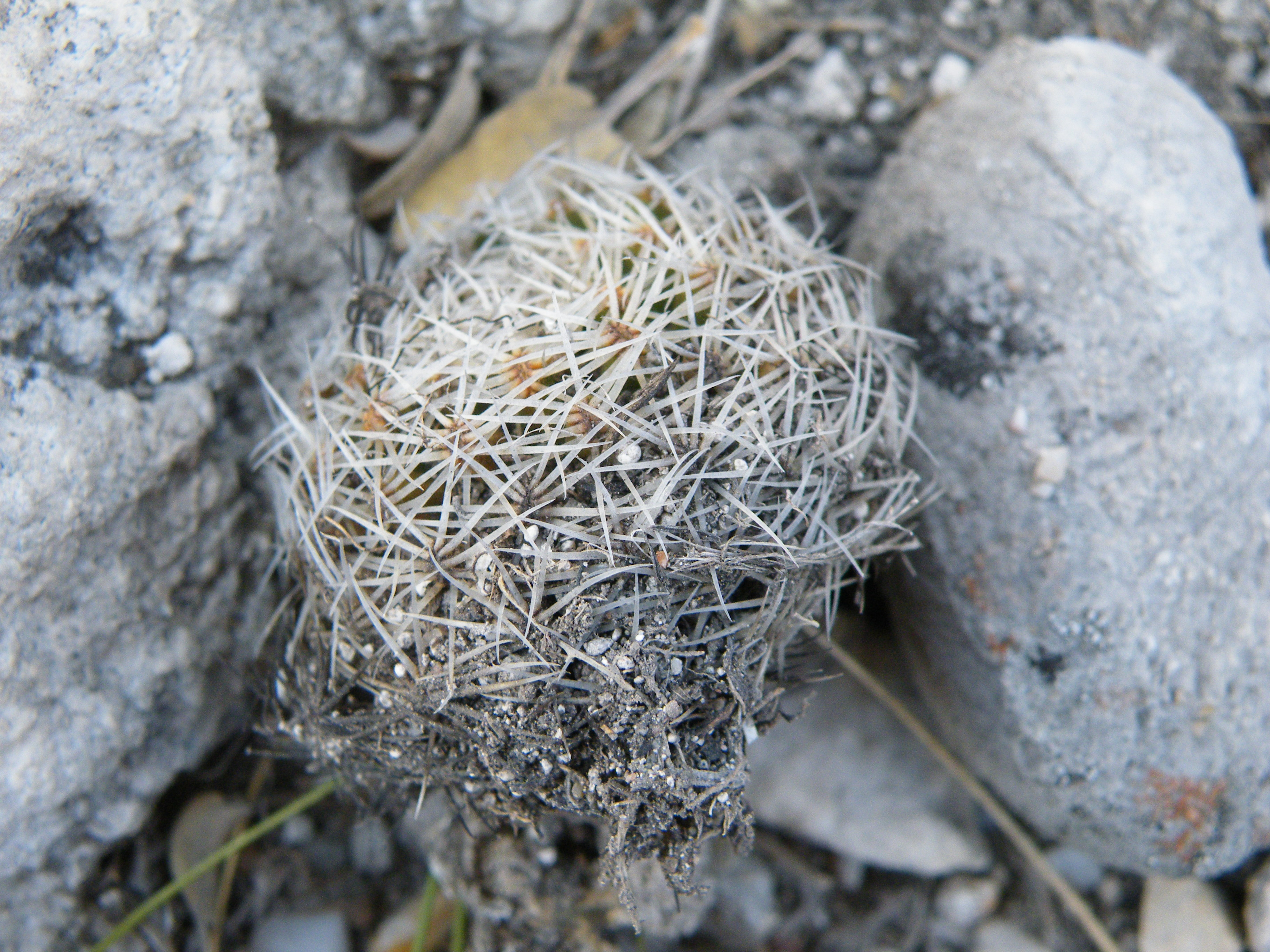 Near Canada Morelos, Puebla